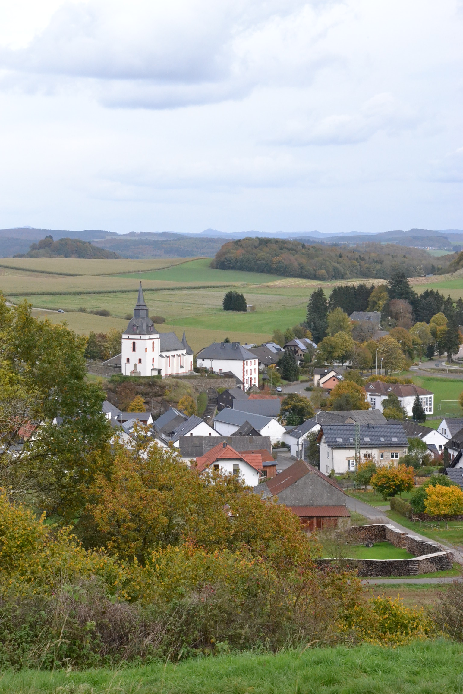 Gezicht op Steffeln, Eifel, Rheinland-Pfalz